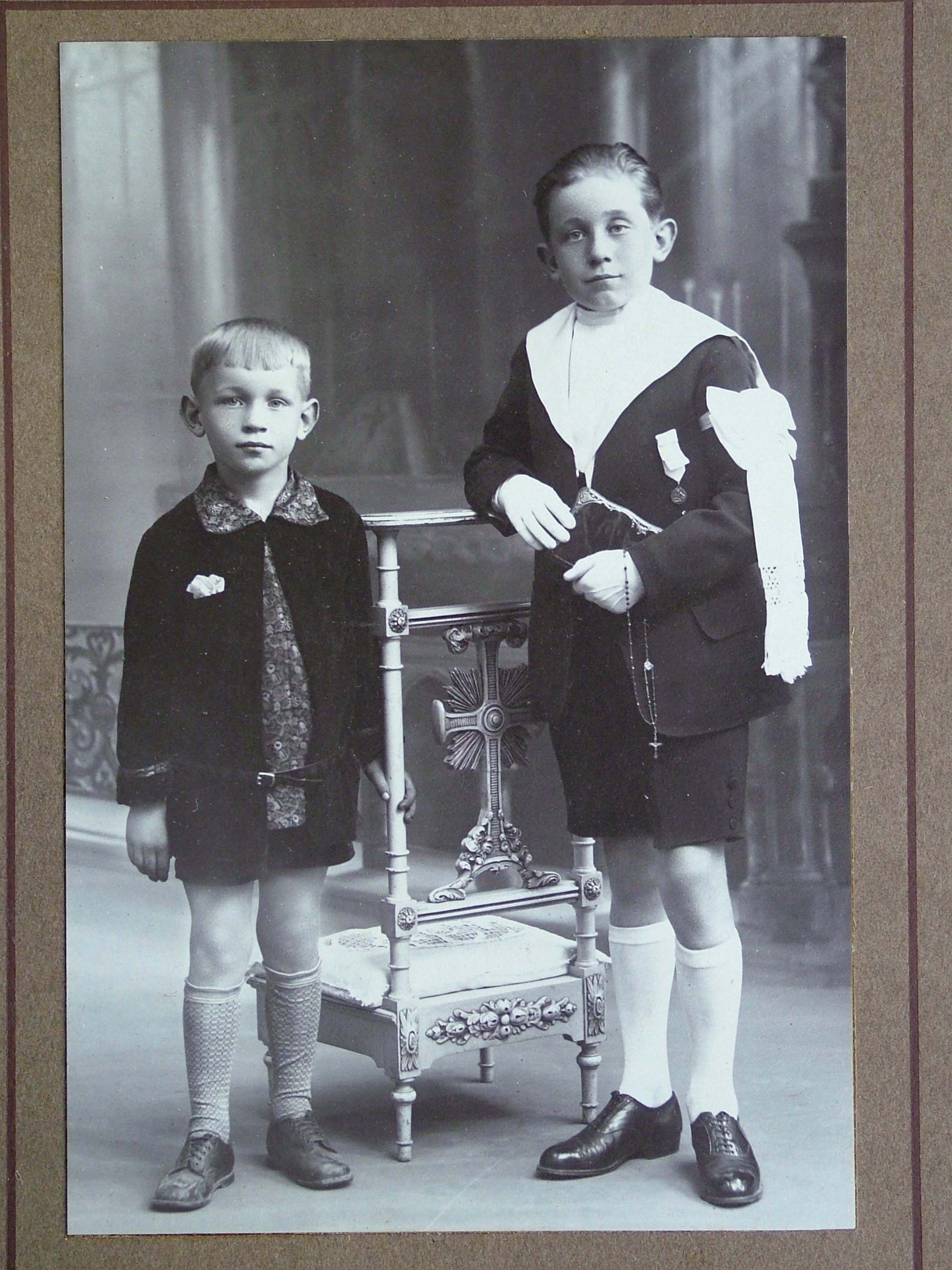 Jean Collot (en compagnie de son frère cadet Jacques) fait sa 1ère communion le 26 mai 1929